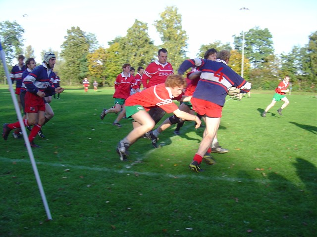 Rugby Spiel. Im Vordergrund bin ich selbst, alle anderen Personen sind von den beiden Bocholter Rugby-Vereinen Bocholter Wassersportverein Abt. Rugby und Phönix Bocholt Abt. Rugby und mit der Veröffentlichung dieser Fotos im Internet einverstanden.